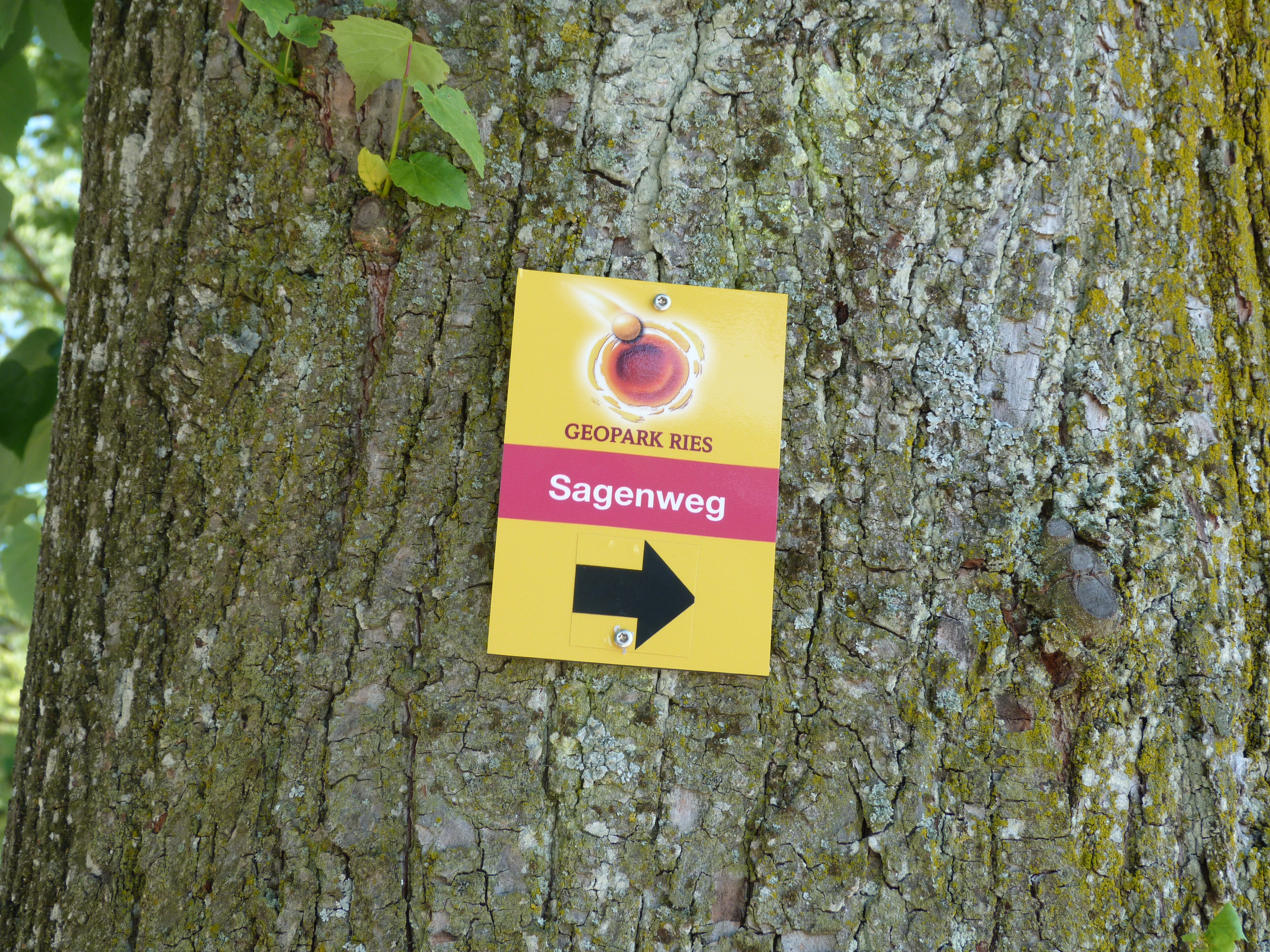 Beschilderung des Themenwanderwegs "Sagenweg - Stationen Wemdinger Geschichte und Geologie"